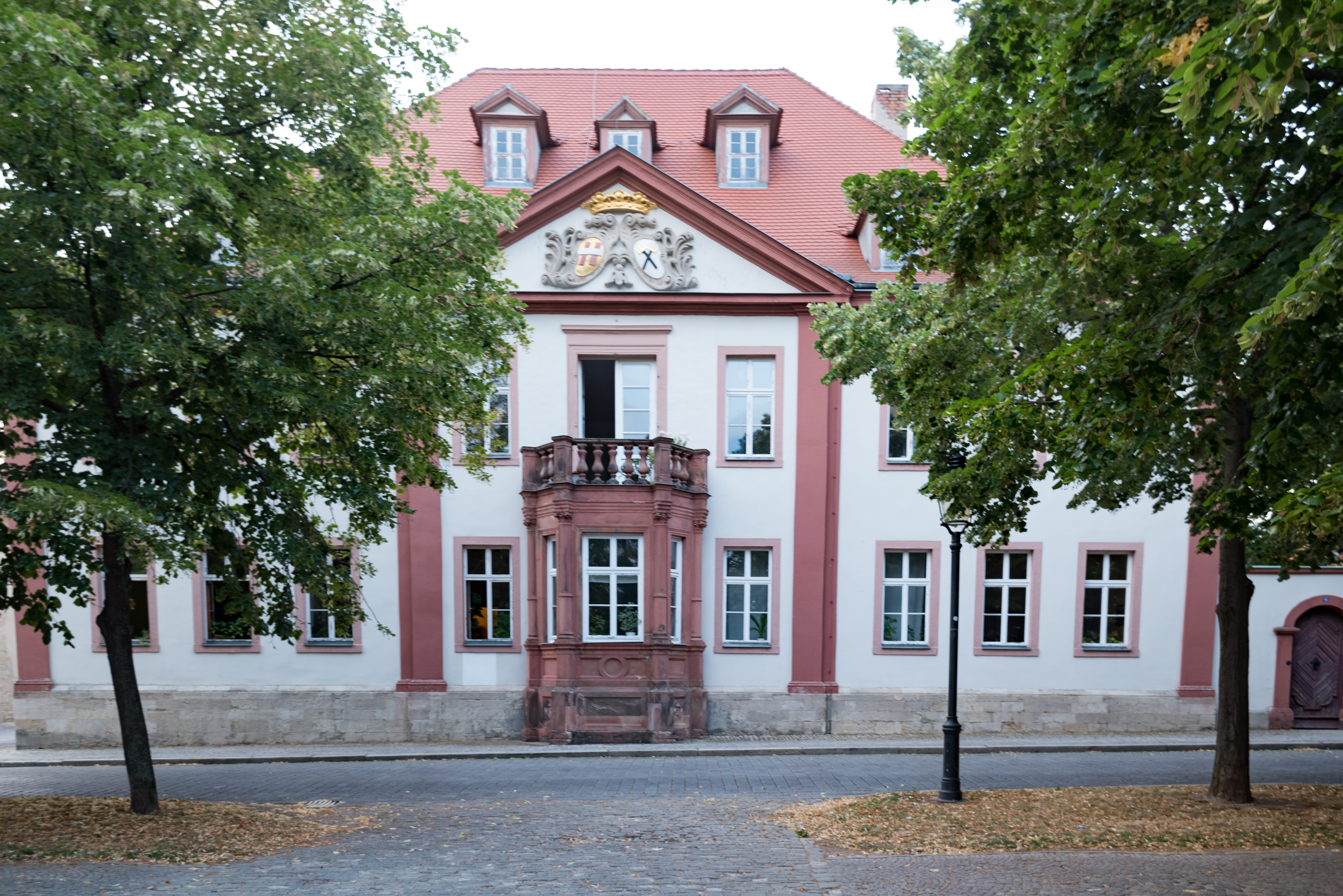 Naumburg (Saale), Domplatz 6